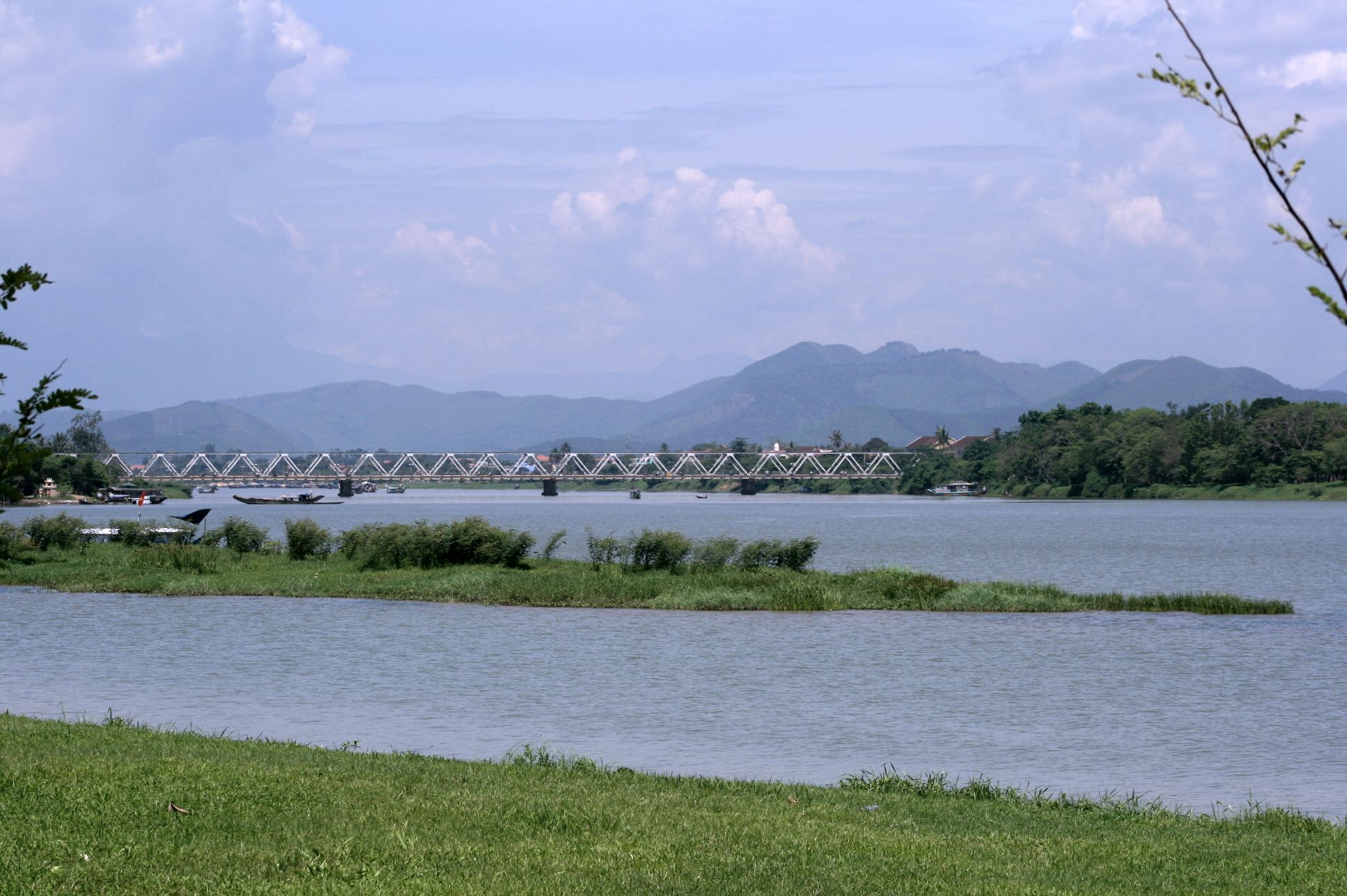 Perfume River in Hue